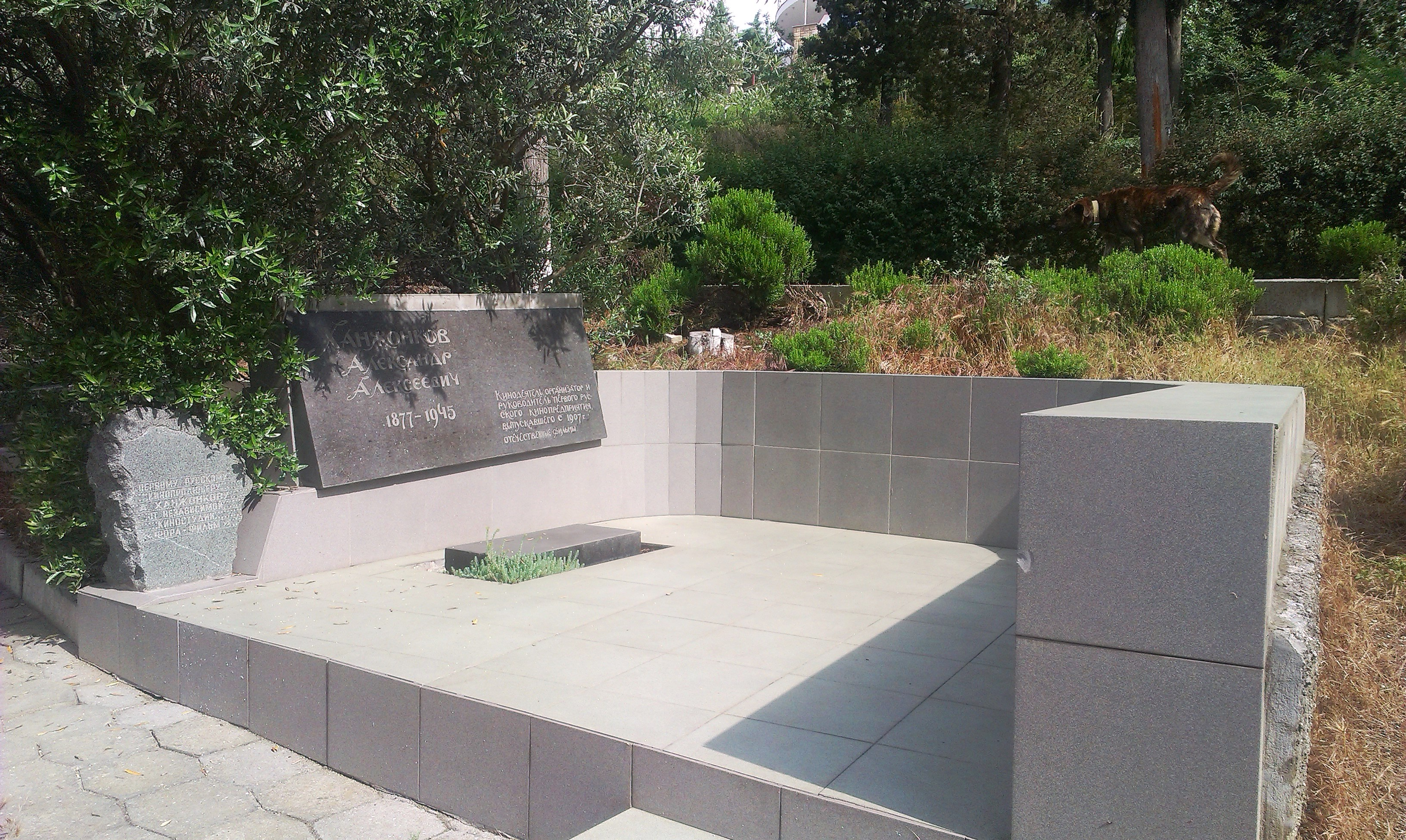 Поликуровский мемориал